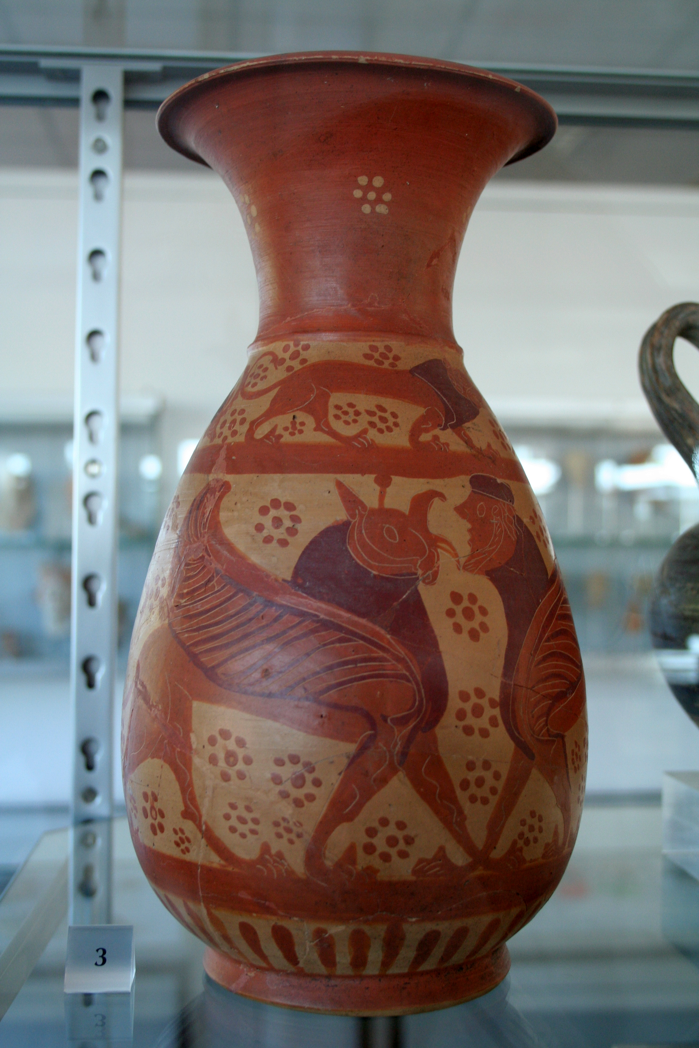 Antike korinthisierende etruskische Olpe, dem Maler der bärtigen Sphinx zugeschrieben; ein großer zentraler Tierfries am Bauch mit einem Panthervogel, einem Löwengreif und einem bärtigen Sphinx sowie ein kleinerer Fries darüber mit einem Steinbock, einem Löwen und einem Hirsch; frühes 6. Jahrhundert v. Chr.; Antikenmuseum der Universität Heidelberg (64/3).